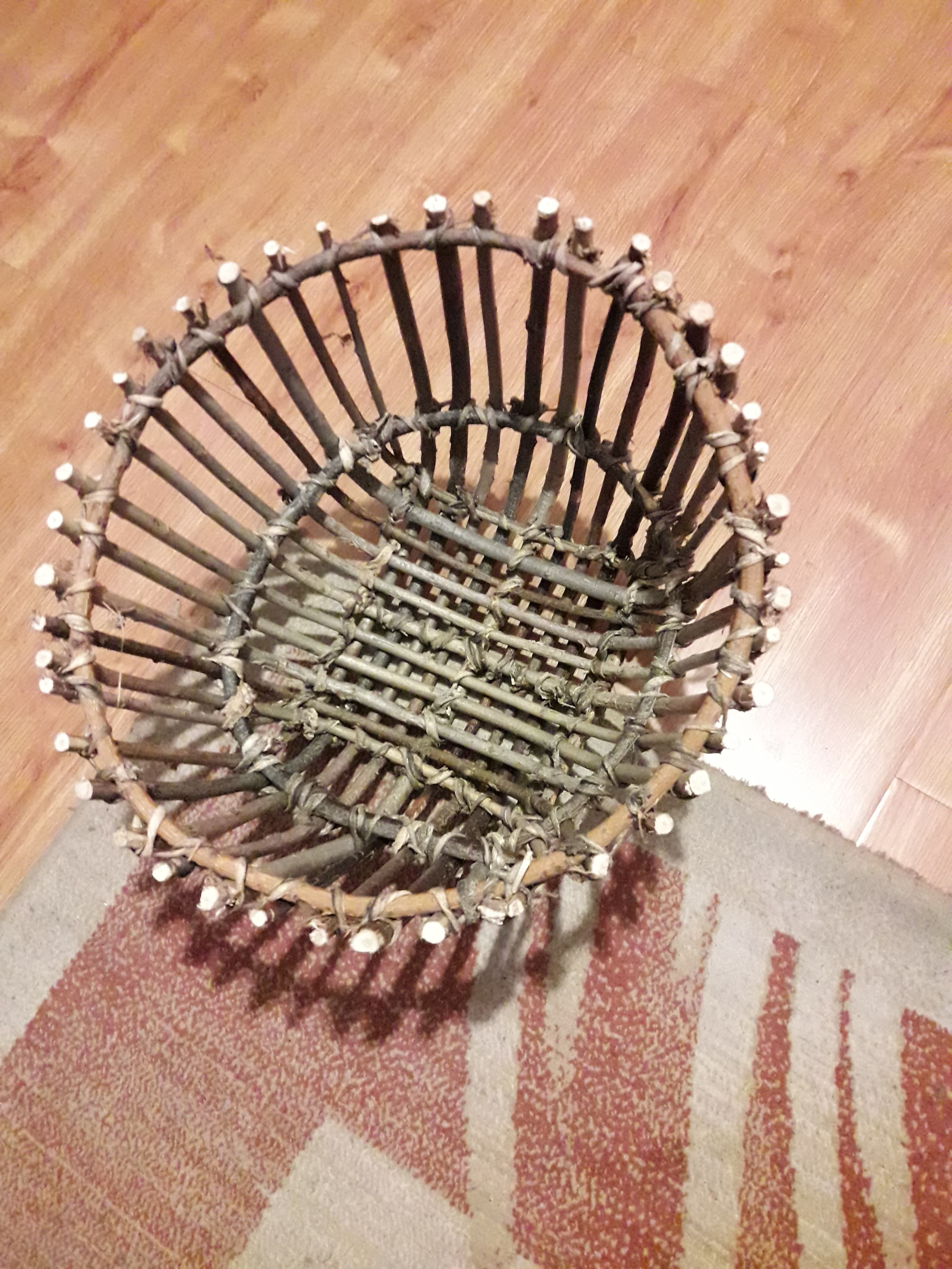 Монгол: Mongolian weaved wooden basket